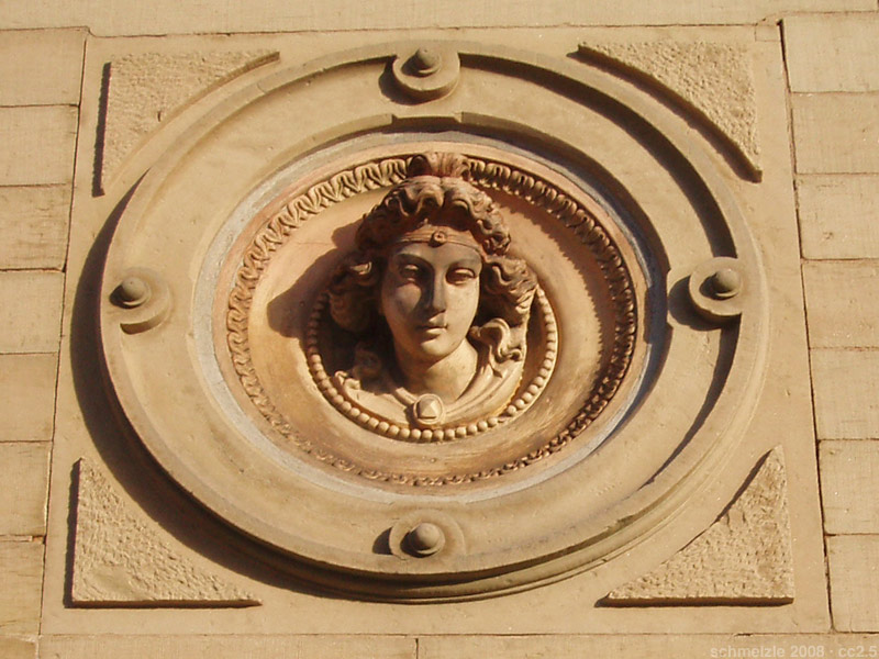 Fassadendetail des historischen Schulhauses in Bad Rappenau-Grombach